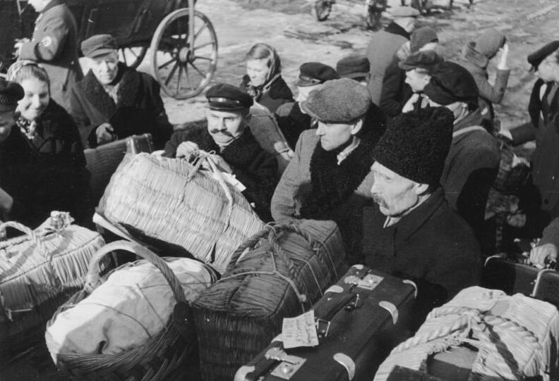 Soldau, Umsiedlung Litauendeutscher Deutsches Ausland-Institut: Soldau Umsiedlung der Litauendeutschen: Gruppe von Umsiedlern mit Gepäck. Propagandakompanien: Prop.-Kp. 621 Rücksiedlung der Litauendeutschen Von den Lagern an den Übergangsstellen dicht hinter der Grenze werden die Rücksiedler weiter in die Auffanglager gebracht, von wo die Weiterleitung an Arbeitsplätze der beruflichen Eignung [Ostpreußen, Soldau.- Litauendeutsche Umsiedler mit ihrem Gepäck.]